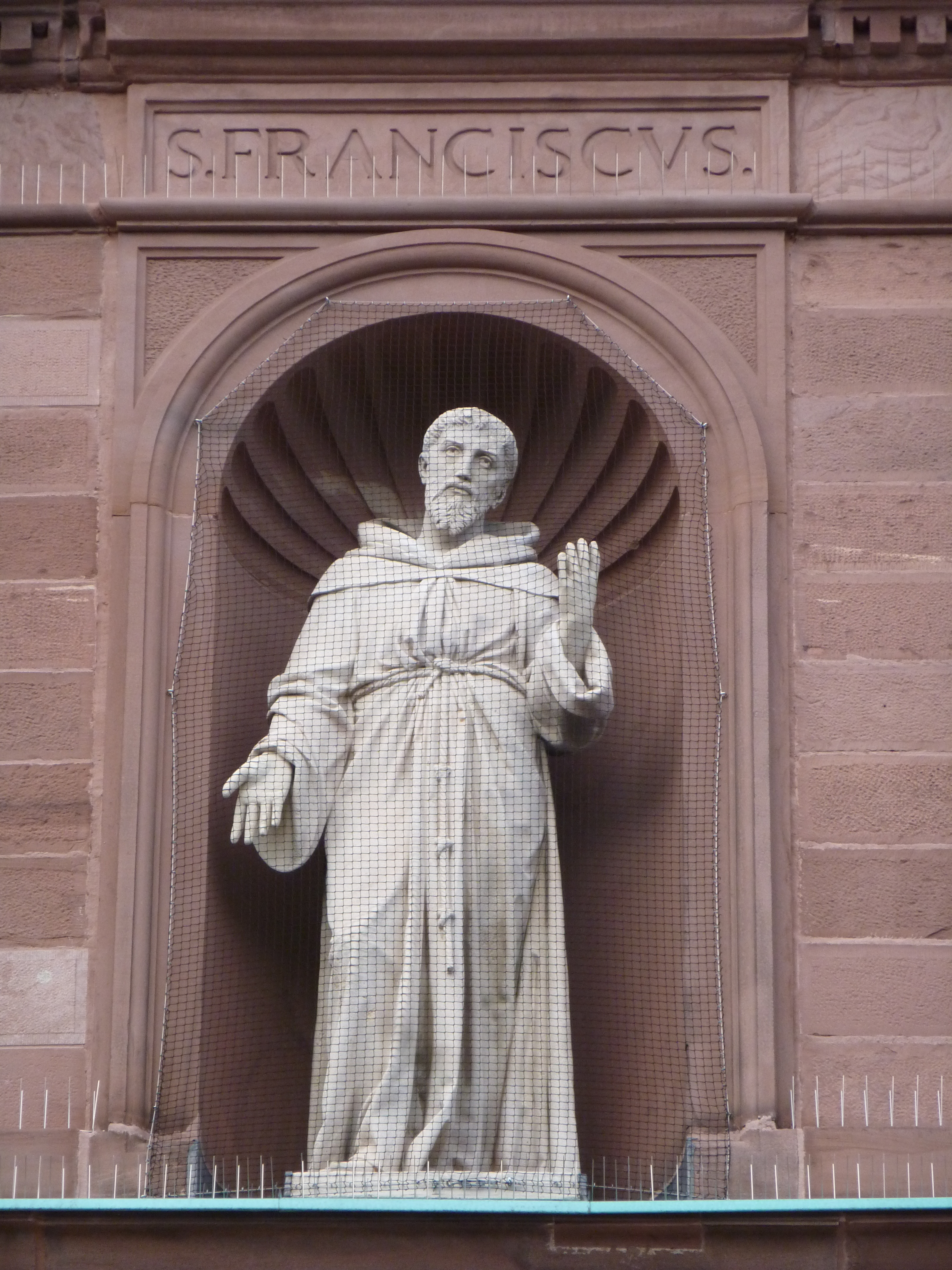 Statue de St François sur la façade de l’église St-François à Pforzheim.